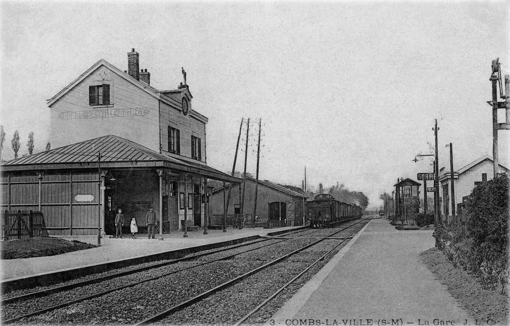 L'ancienne gare de Combes-la-Ville - Quincy du temps ou la ligne n'était constituée que de deux voies. Les infrastructures visibles : bâtiment voyageurs, hall marchandises et abri de quais ont aujourd'hui disparues au profit de nouvelles installations.